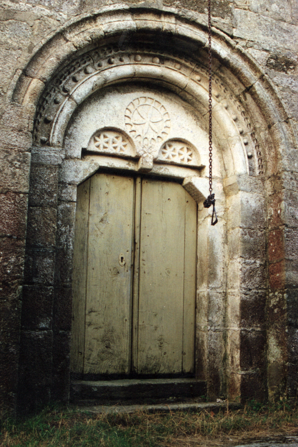 portada principal de la Iglesia románica de Sto. Estevo de Grallás (Páramo)